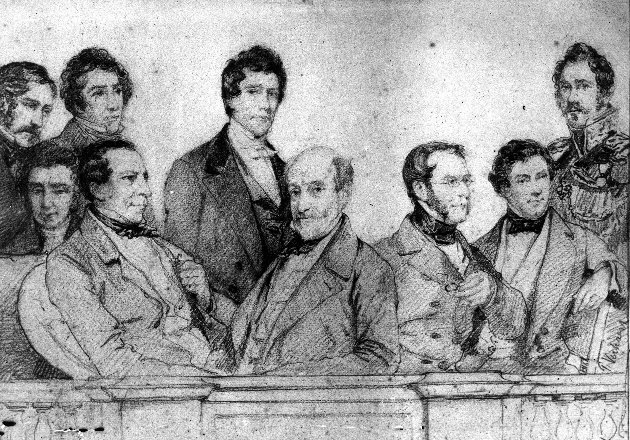 Gouvernement Provisoire de la Belgique en septembre 1830. Projet pour portrait en gravure du Gouvernement Provisoire de Belgique en 1830 (reconstitution historique. Dessin de Piet Verhaert (1852-1908), vers 1886) - De gauche à droite, 1er rang: Joseph Vander Linden, Félix de Merode, Louis de Potter, Feuillien de Coppin, Alexandre Gendebien - 2nd rang: André Jolly, Charles Rogier, Sylvain Van de Weyer, Emmanuel van der Linden d'Hooghvorst - Sources: Arch. famille de Potter, coll. R. Gendebien, bibl. CEGES Bruxelles.